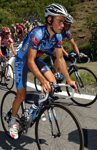 Afbeelding van Javier Ramirez Abeja.